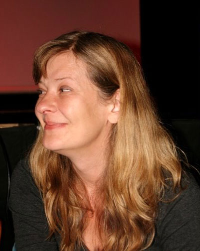 Sarah Schmidt bei der Berliner Lesebühne Brauseboys in Berlin (2009)